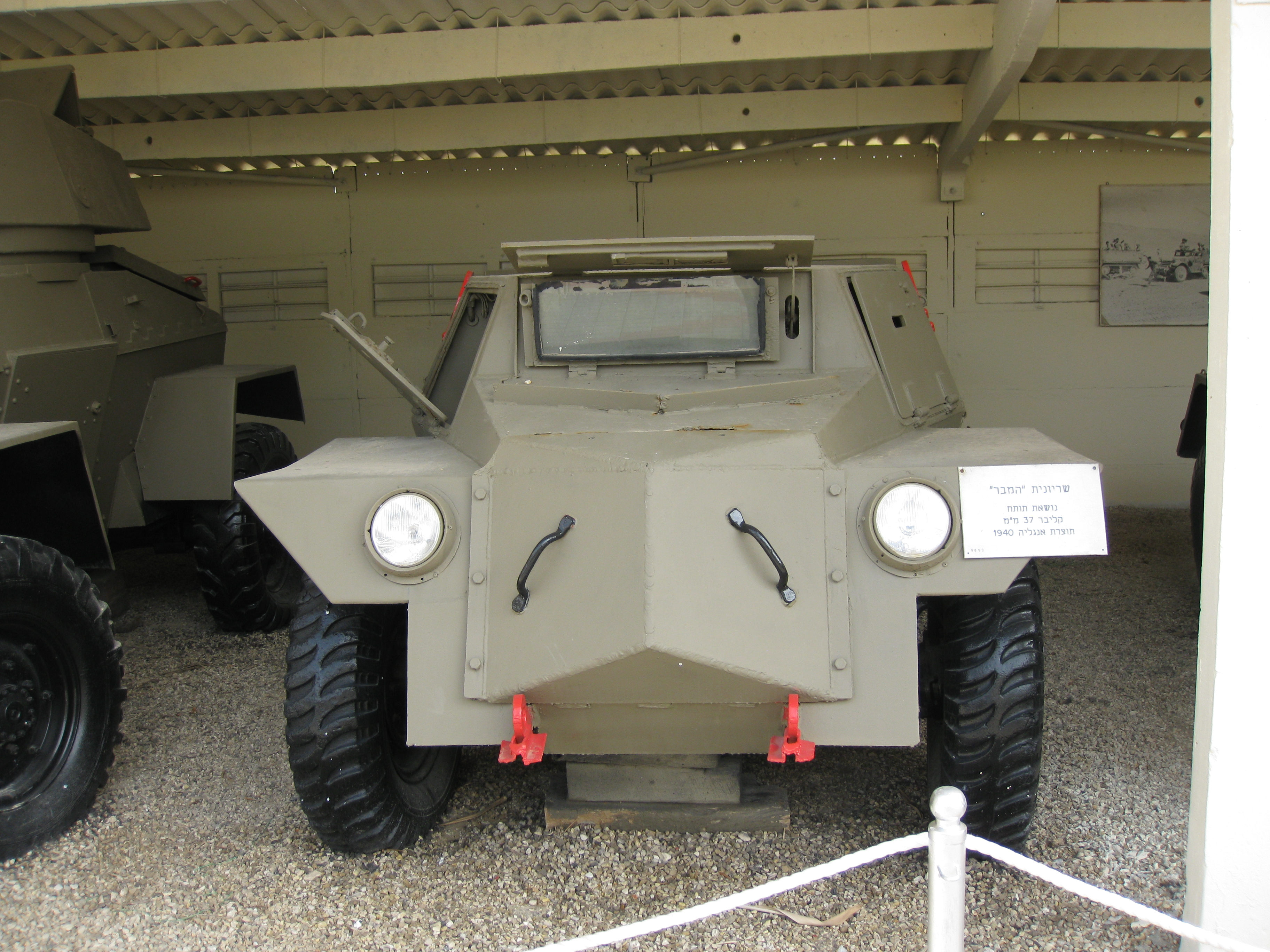 Batey ha-Osef Museum - Armoured vehicles מוזיאון בתי האוסף - משורייני תש"ח